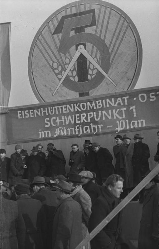 Grundsteinlegung im Hüttenkombinat Ost ADN-ZB/Sturm, 1.1.1951 Grundsteinlegung im Hüttenkombinat Ost-Auftakt zum Fünfjahresplan Am Neujahrstag 1951 legte Minister Selbmann im Eisenhüttenkombinat, dem Schwerpunkt 1 des Fünfjahresplans, den Grundstein zum Hochofen 1. UBz: Übersicht während der Grundsteinlegung. Abgebildete Personen: Selbmann, Fritz: Stellvertretender Ministerpräsident, SED, KPD, USPD, MdL Preußen, MdR, DDR